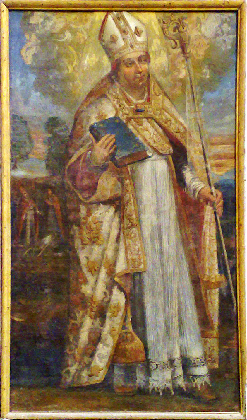 Saint Gérard de Toul, évêque de Toul - Peinture par Rémond CONSTANT, 1625 présente dans la Cathédrale St Étienne de Toul (Meurthe-et-Moselle, France)